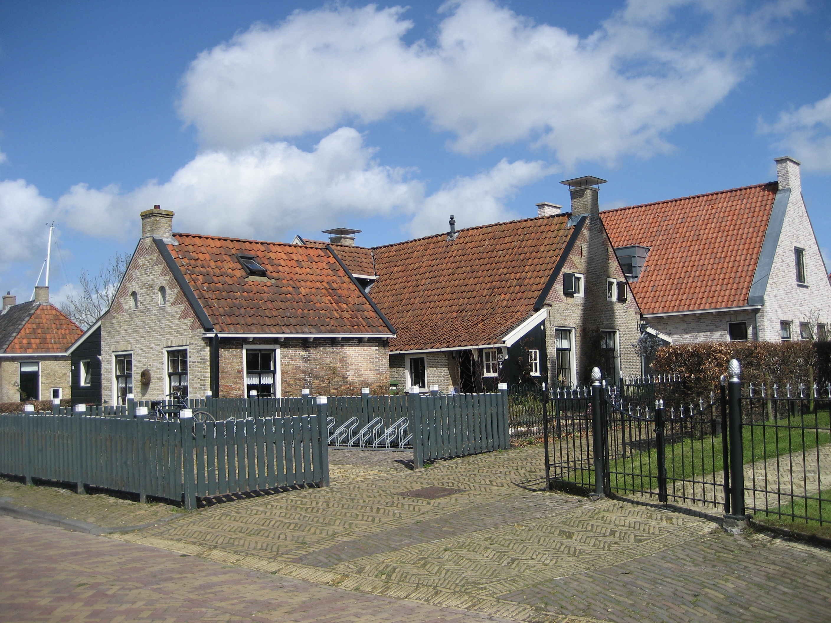 Buorren 43, Uitwellingerga, Friesland